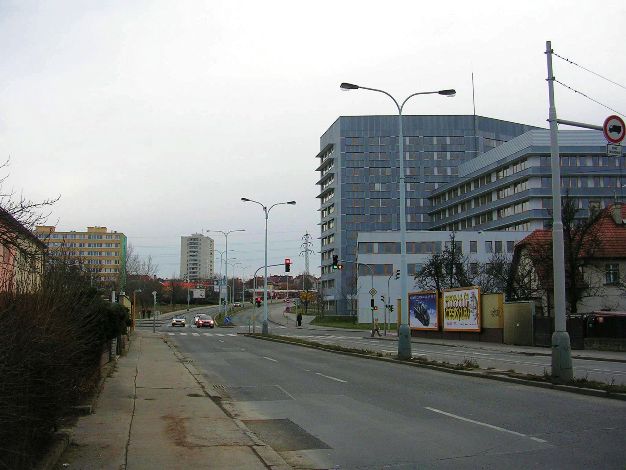 Česky: Praha, Strašnice, Český statistický úřad a ulice Úvalská a Na padesétém (v pozadí stanice metra Skalka)